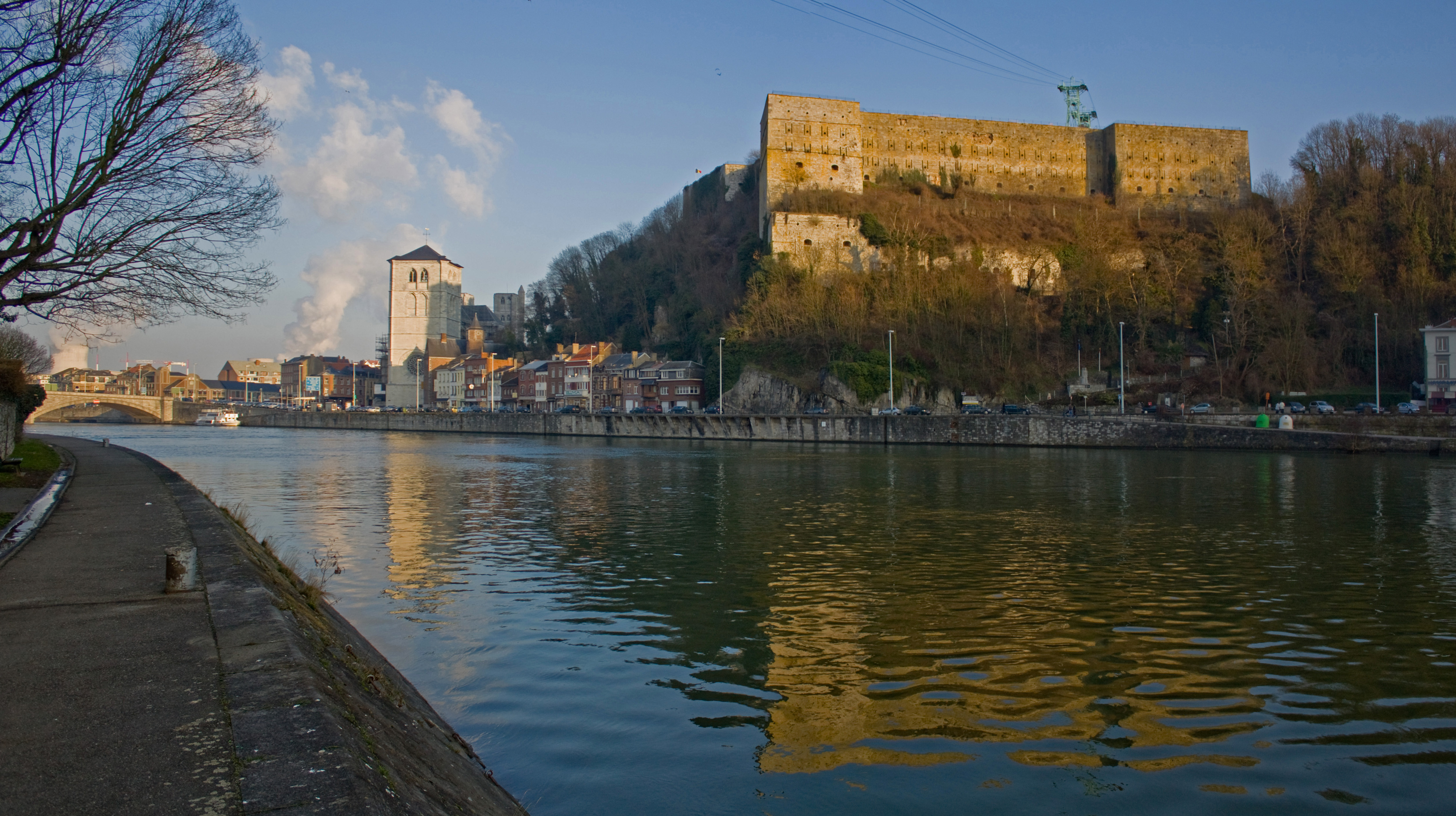 Het fort van Huy